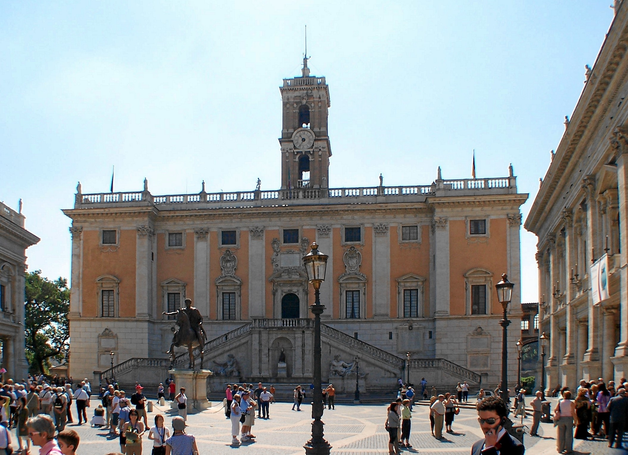 Palazzo Senatorio, Kapitol, Rom